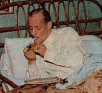 Julián Centeya. Poeta. Tango. Argentina